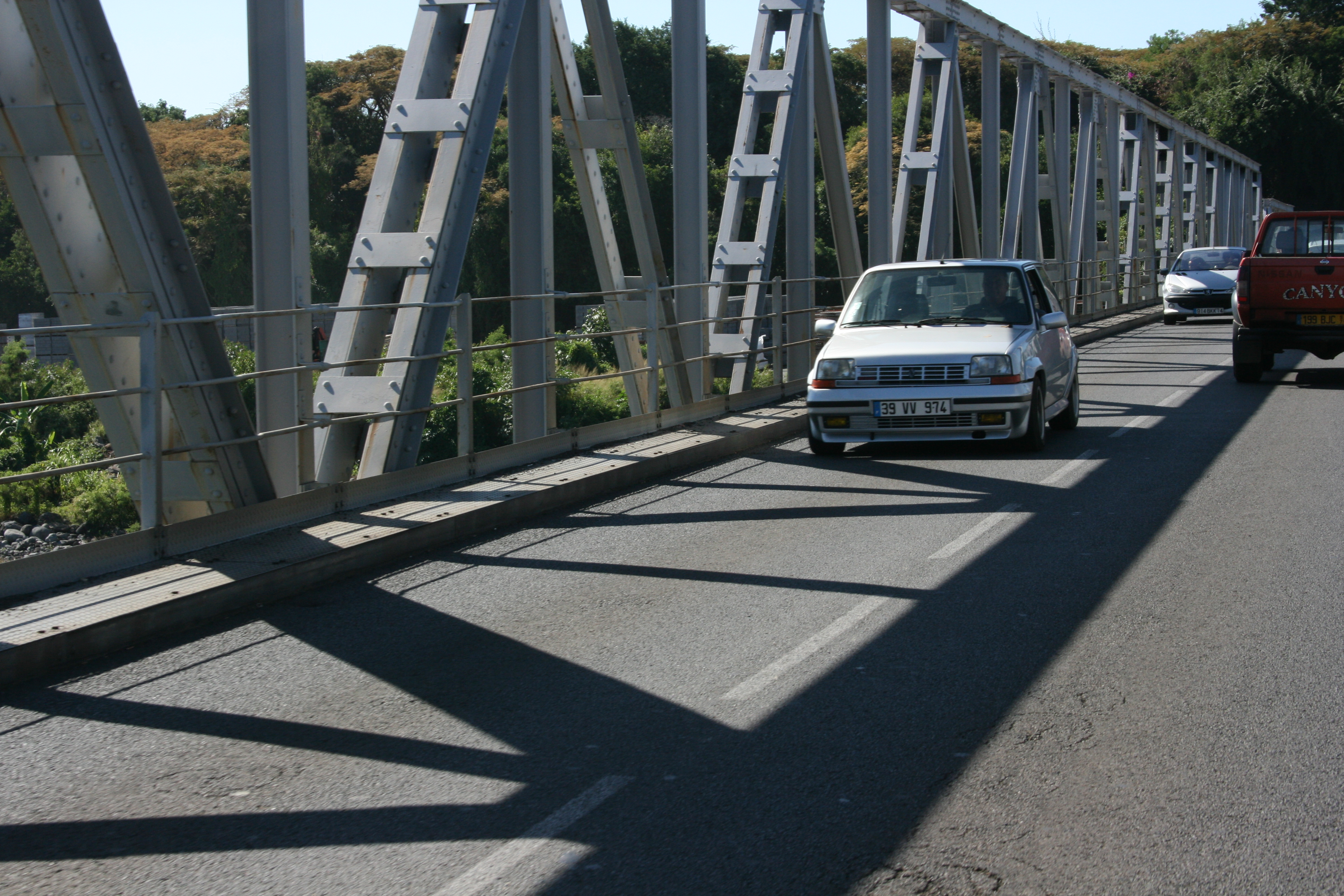 Vue du trafic routier sur le pont Neuf de la Rivière des Pluies, à La Réunion.